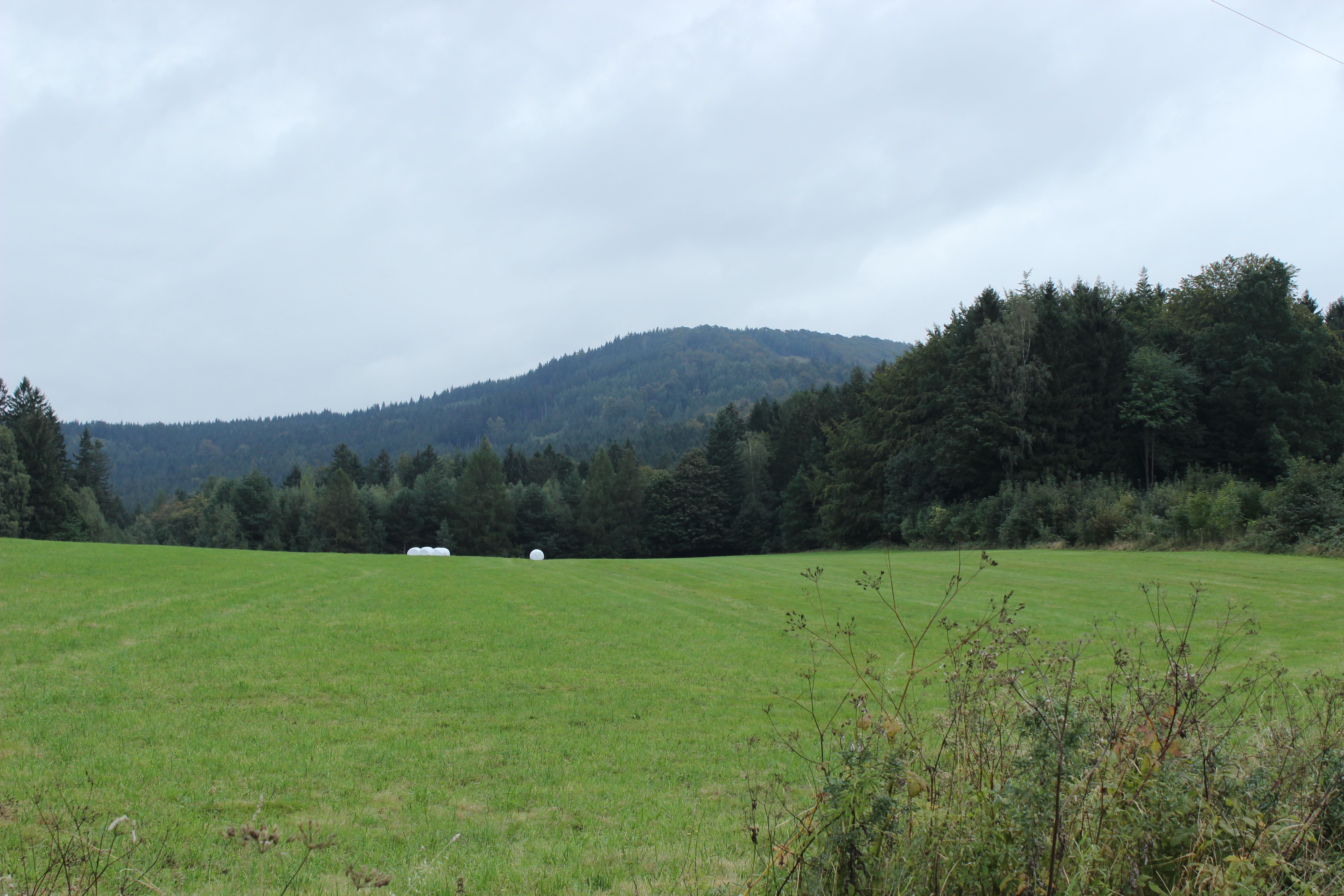 Svinský vrch při pohledu z Lázní Libverdy.